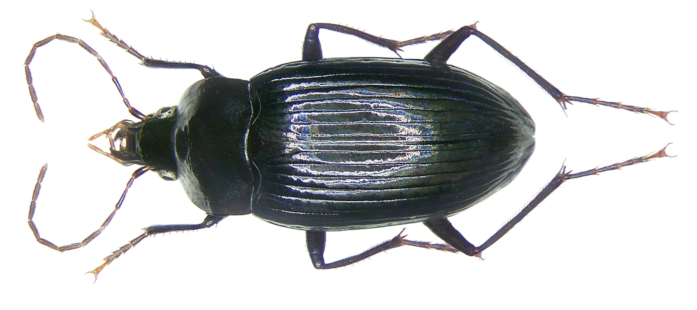 Familie: Carabidae Groesse: 10 mm Fundort: Indonesien, Irian Jaya, Mokwam leg. A.Skale, 2007; det. M.Baehr, 2007 Paratypus Photo: U.Schmidt, 2007